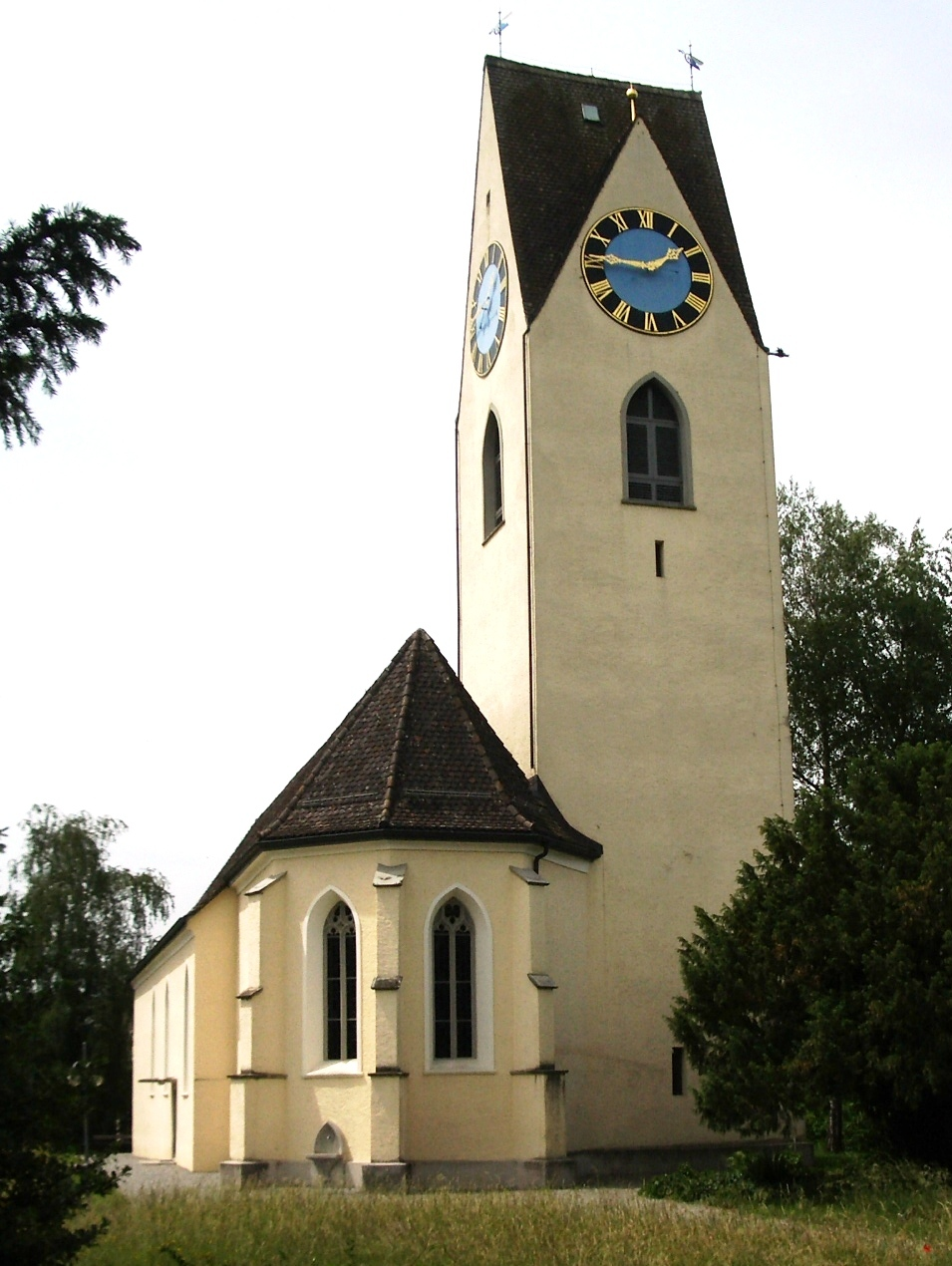 Ottenbach ZH, Switzerland